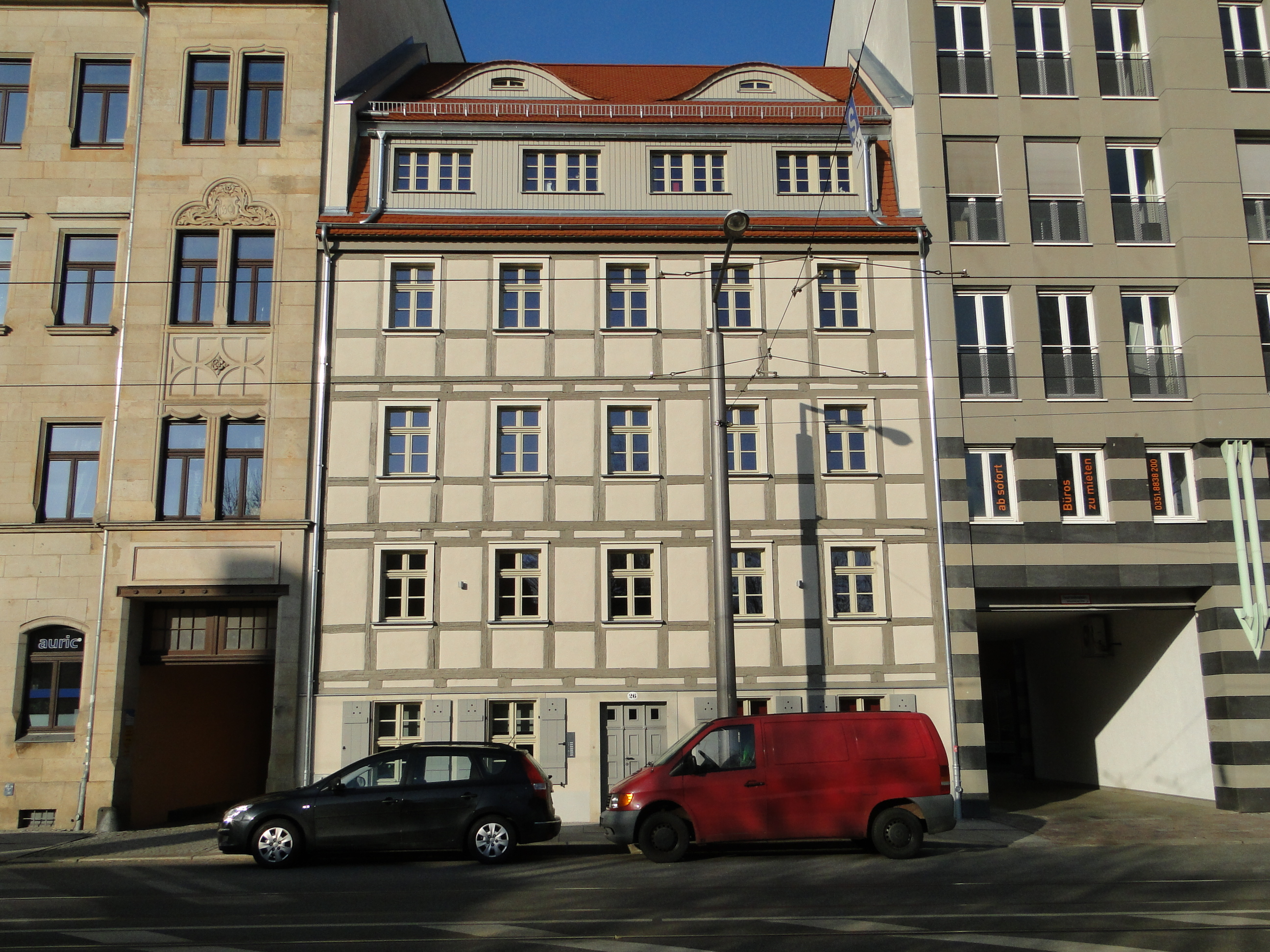 Manufakturhaus Friedrichstraße 26 in Dresden-Friedrichstadt 2012